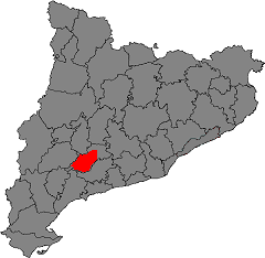 Àrea de la Denominació d'Origen Conca de Barberà